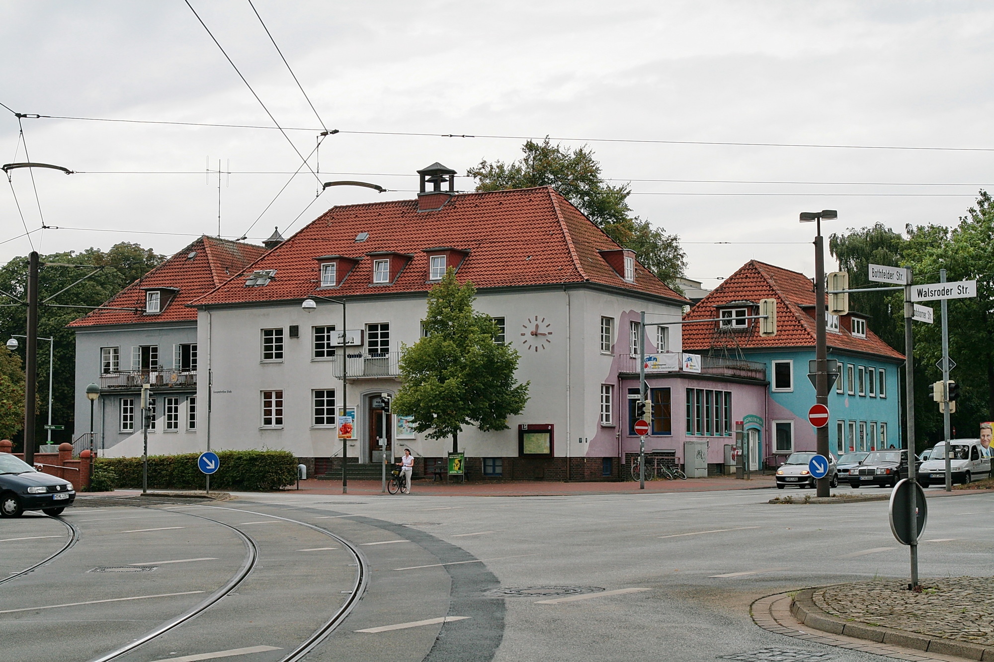 Haus der Jugend, früheres Rathaus in Langenhagen, Niedersachsen, Deutschland